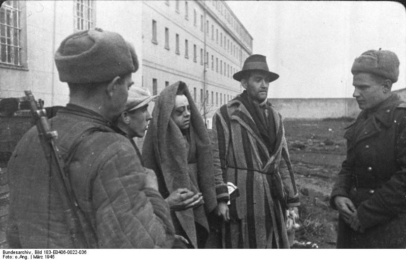 Zuchthaus Sonnenburg, überlebende Gefangene Zentralbild II. Weltkrieg 1939 - 45 An der Front vor Küstrin, März 1945. Vor dem Anrücken der Roten Armee wurden im Zuchthaus in Sonnenburg/Neumark 8.000 Insassen von den Faschisten ermordet. UBz: Zwei Überlebende, die sich bei den Massenerschießungen hinwarfen und totstellten, und so lebend dem Massaker entkamen. [Zuchthaus Sonnenburg (Neumark).- Überlebende Häftlinge mit zwei sowjetischen Soldaten nach der Befreiung]